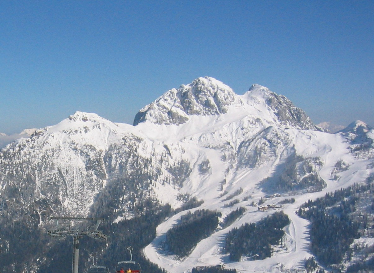 Der Gartnerkofel im Winter vom Westen gesehen